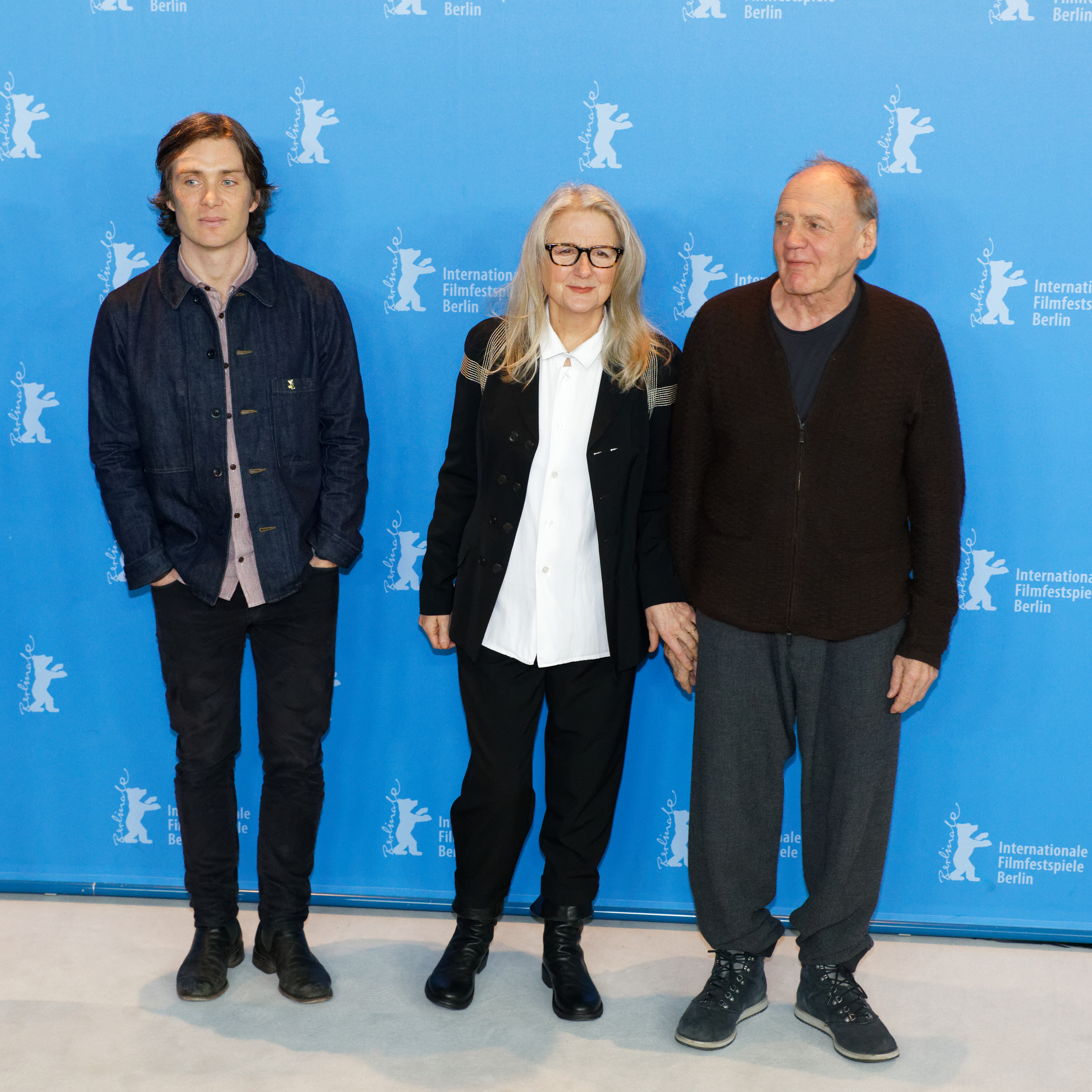 Cillian Murphy, Sally Potter und Bruno Ganz beim Photo Call zu The Party bei der Berlinale 2017